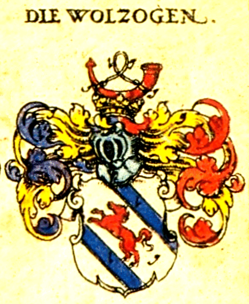 Wappen derer von Wolzogen